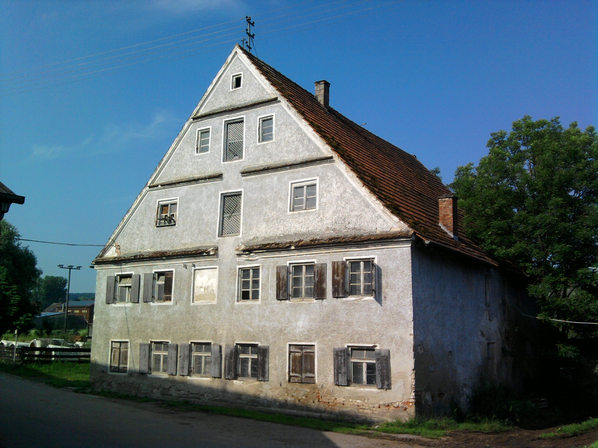 Kirchhaslach ehemalige Mühle erbaut um 1720